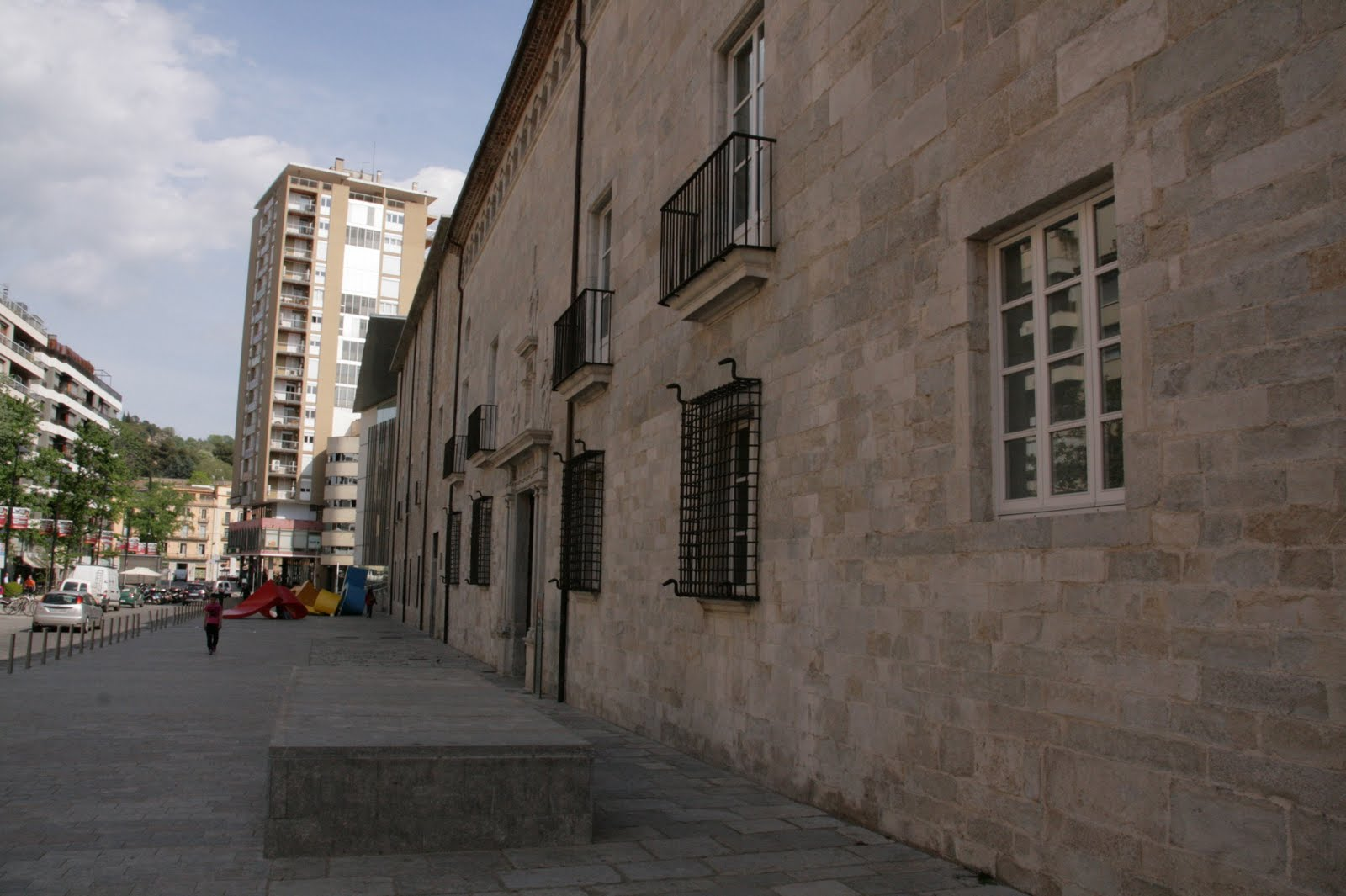 Exposició Anatomia d'un quadre, al voltant de l'obra El Gran dia de Girona al Museu d'Art de Girona